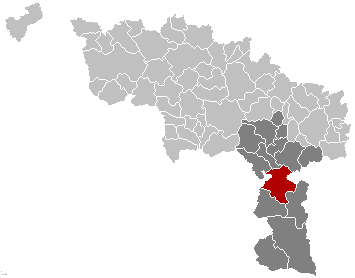 Gemeentekaart Beaumont (Waals: Biômont), een stad in de provincie Henegouwen in België. Eigen werk